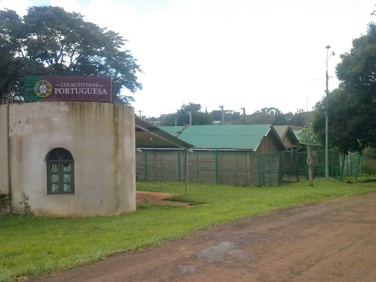 La «Casa Portuguesa» en el Parque de las Naciones de Oberá.